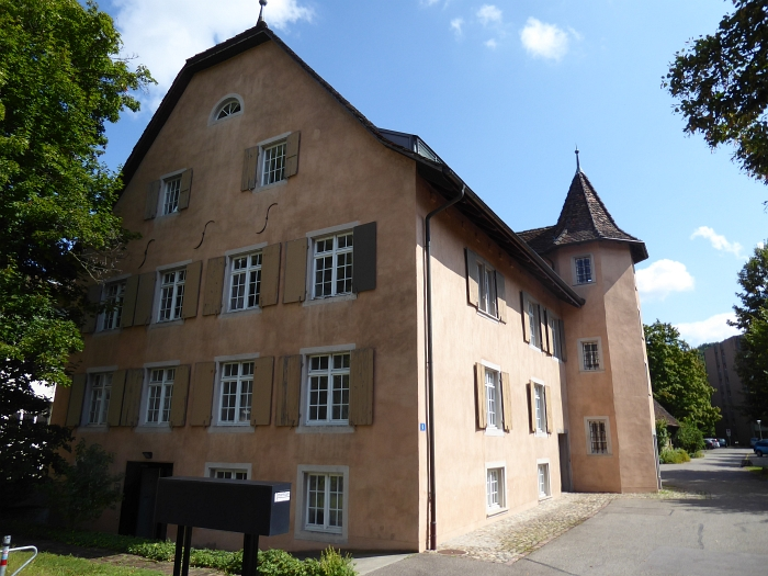 Hammerschmiede, Münchenstein